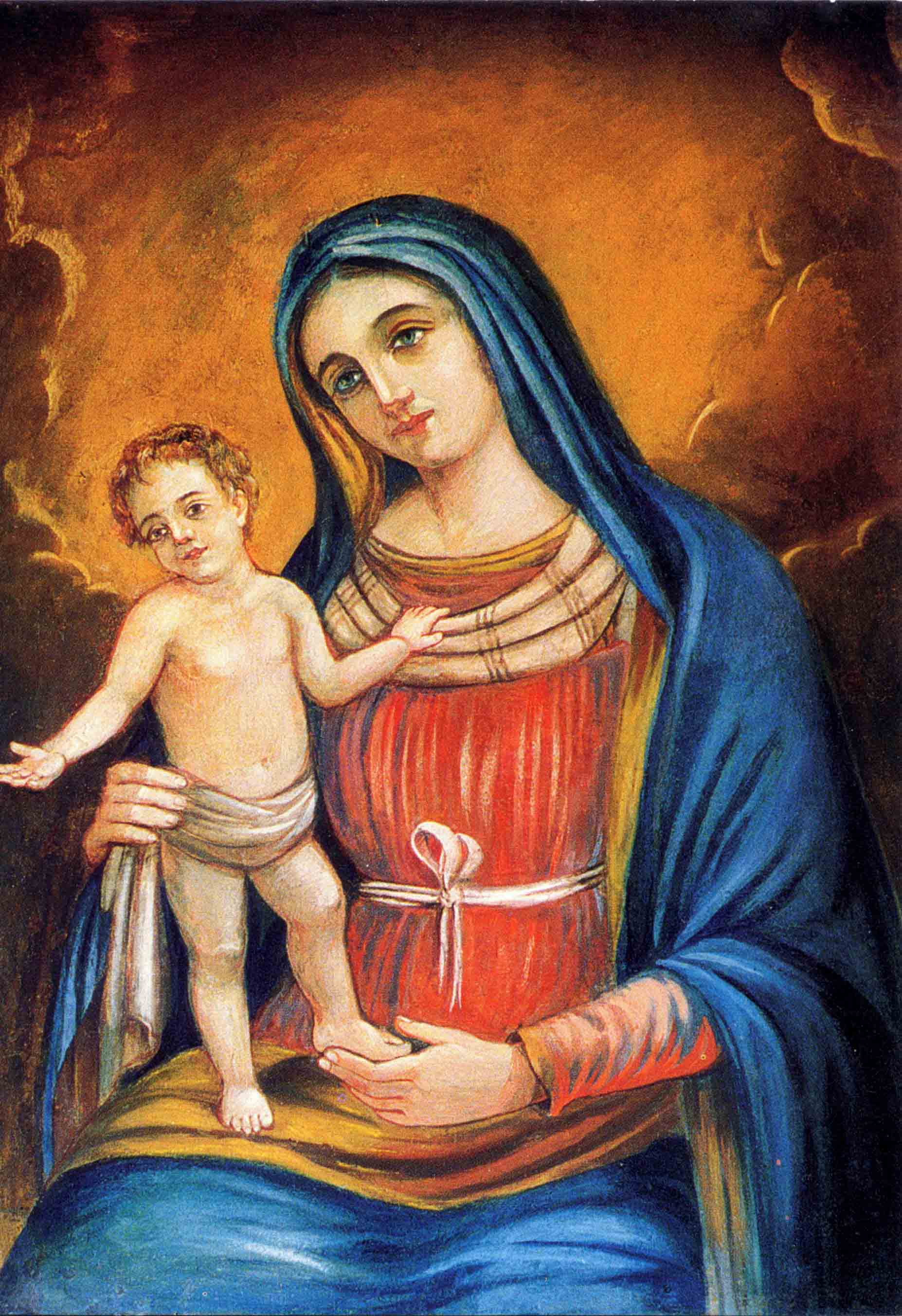 Immagine sacra della Beata Vergine del Borghetto custodita nell'omonimo santuario all'interno della chiesa di San Michele Arcangelo